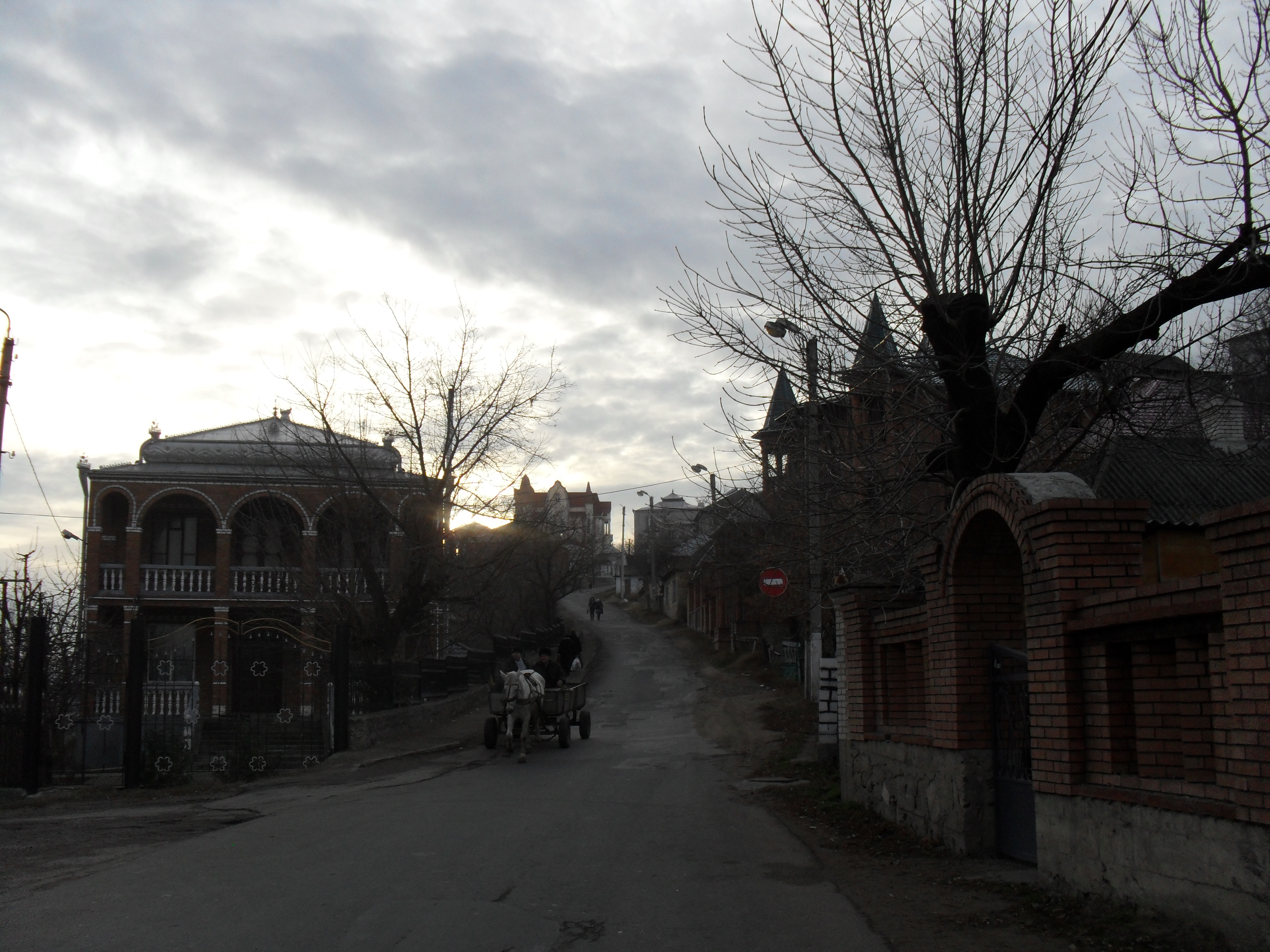 Циганський квартал у м. Атаки